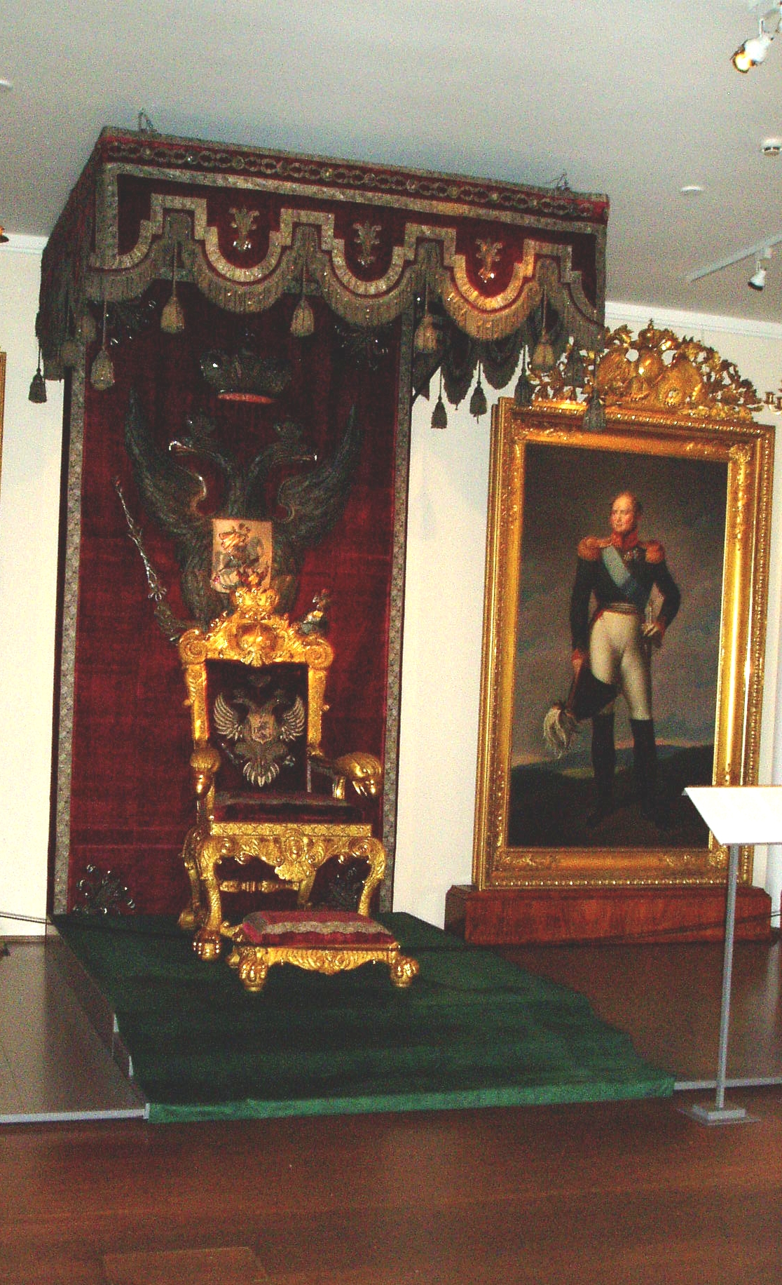 Keisari Aleksanteri I:n Porvoon valtiopäivillä 1809 käyttämä valtaistuin. Istuimen teetti keisari Paavali I Pietarissa vuonna 1797. Valtaistuin on kuulunut Suomen kansallismuseon kokoelmiin vuodesta 1919 alkaen.